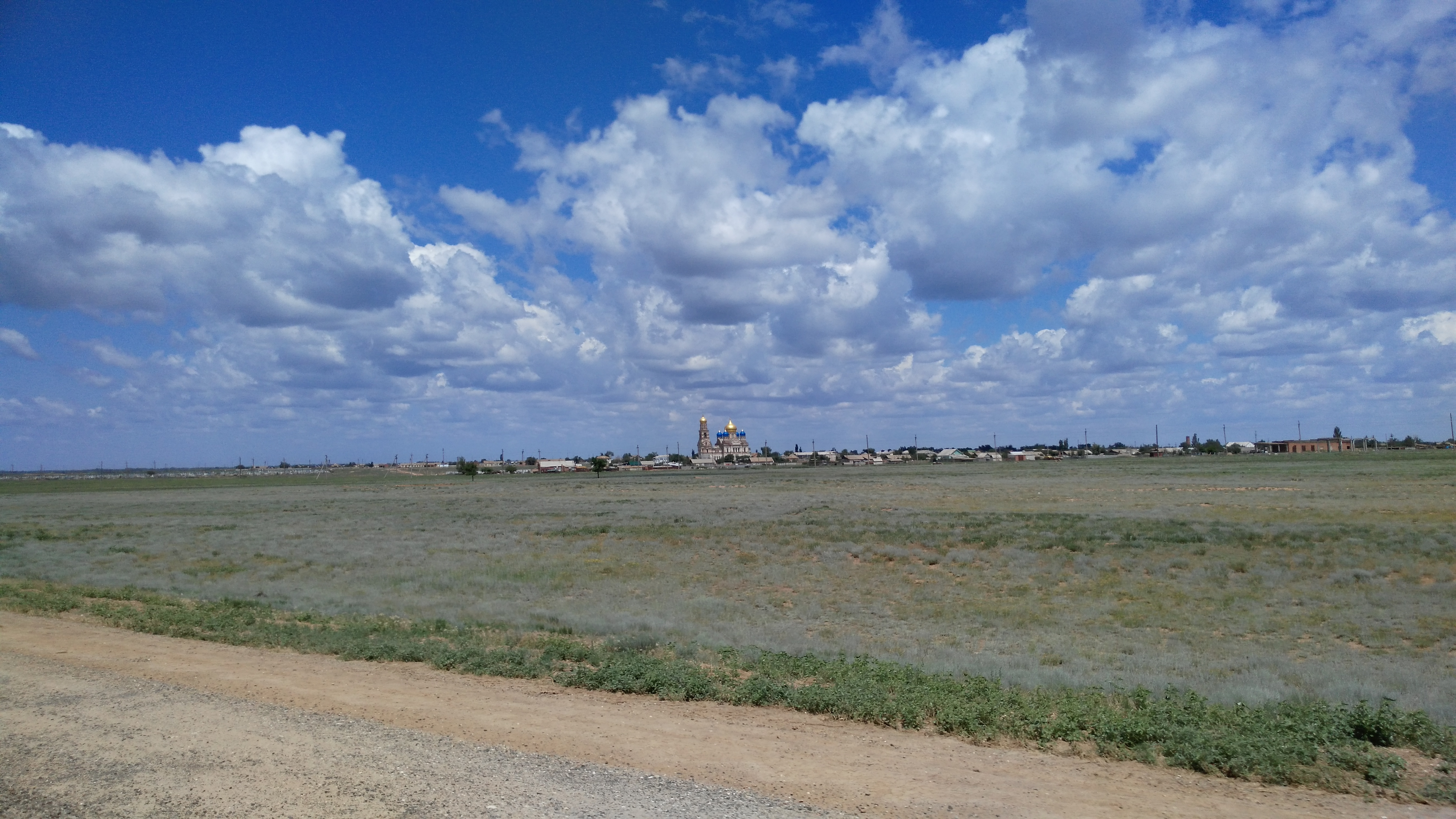 Село Никольское Енотаевского района Астраханской области. Вид на село с трассы М-6. 2016 год